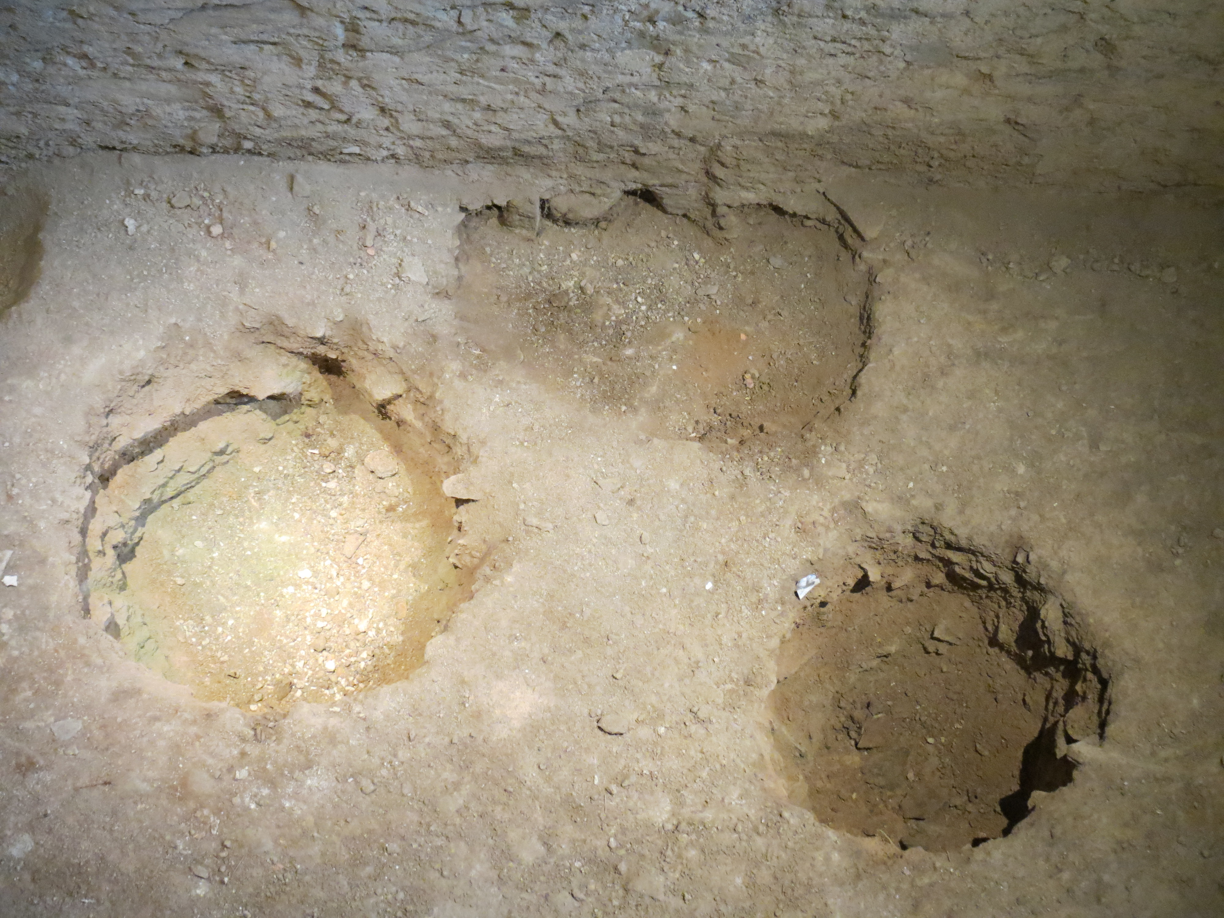 Palais carolingien du château de Mayenne, Pays de la Loire. Trous de poteaux de l'édifice antérieur au palais carolingien.